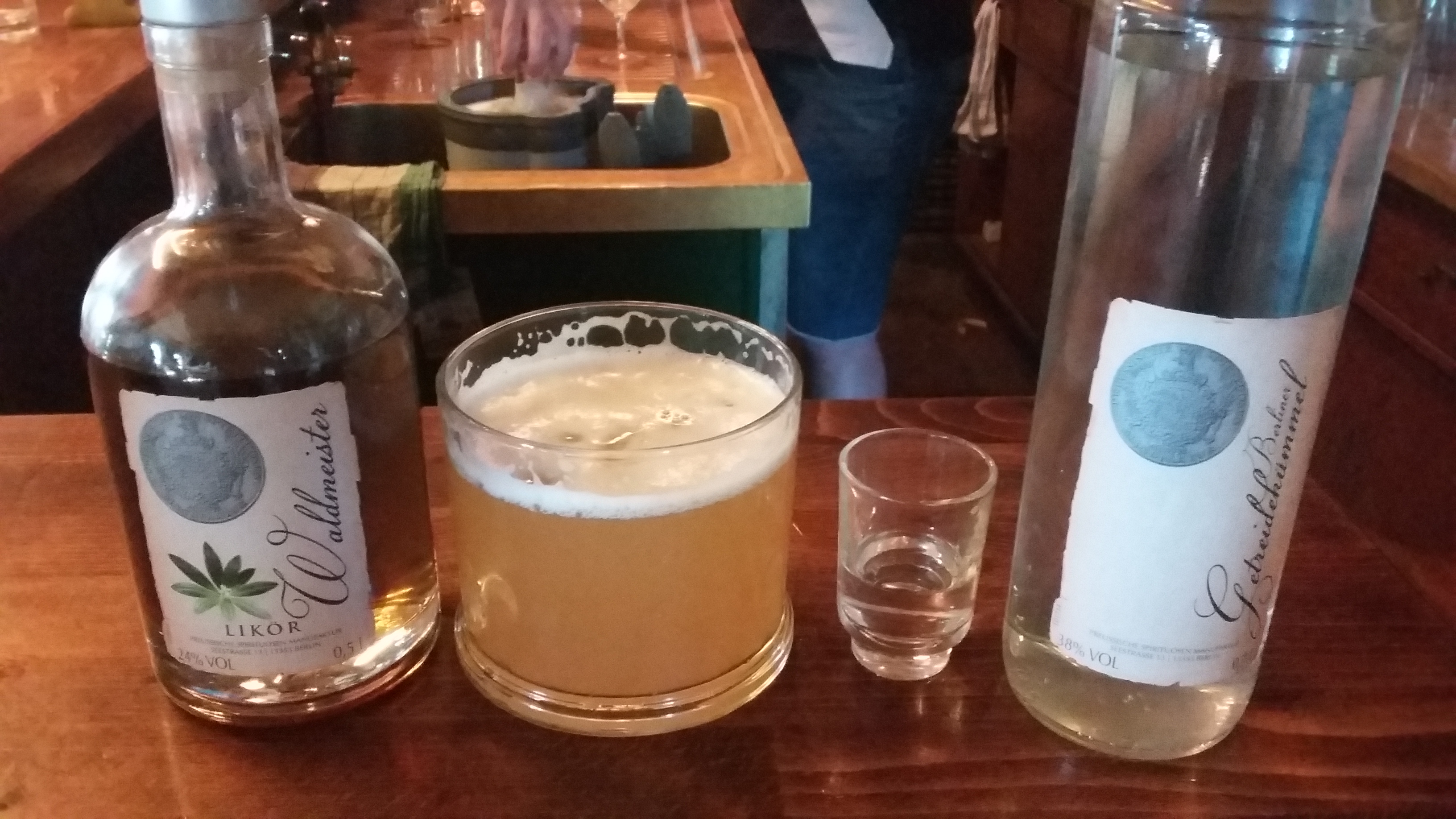 Berliner Weisse von der VLB mit Waldmeister-Likör und Kümmel-Schnaps vor der Preussischen Spirituosen-Manufaktur